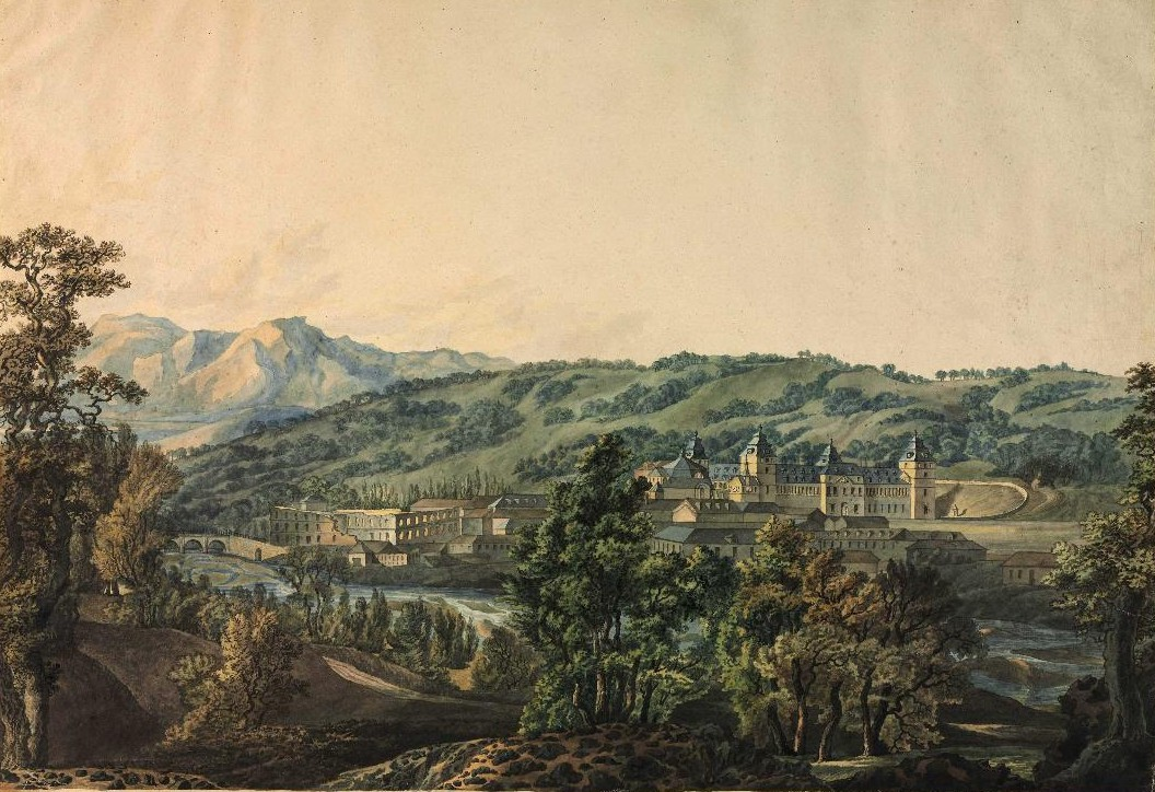 Vista del Monte y Palacio de El Pardo (1820). Biblioteca Nacional de España (Madrid, España).